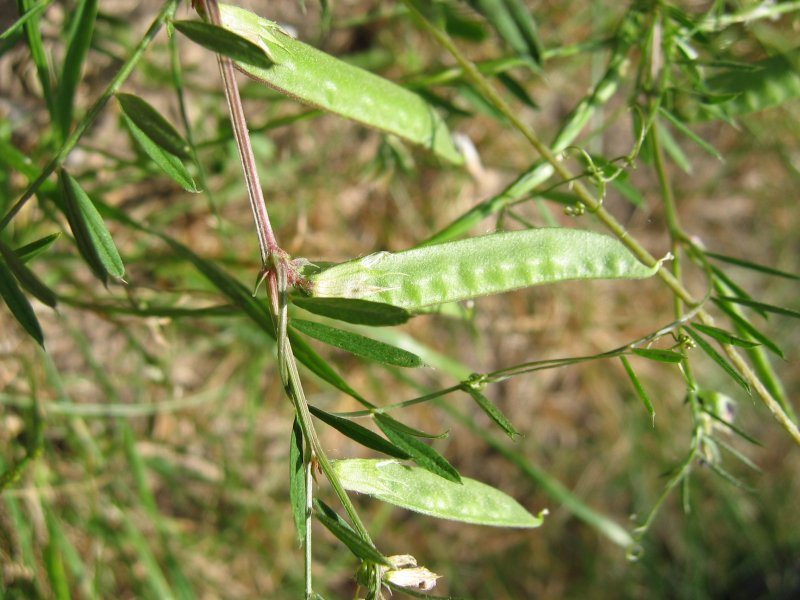 unreife Hülse von Vicia sativa ssp. nigra